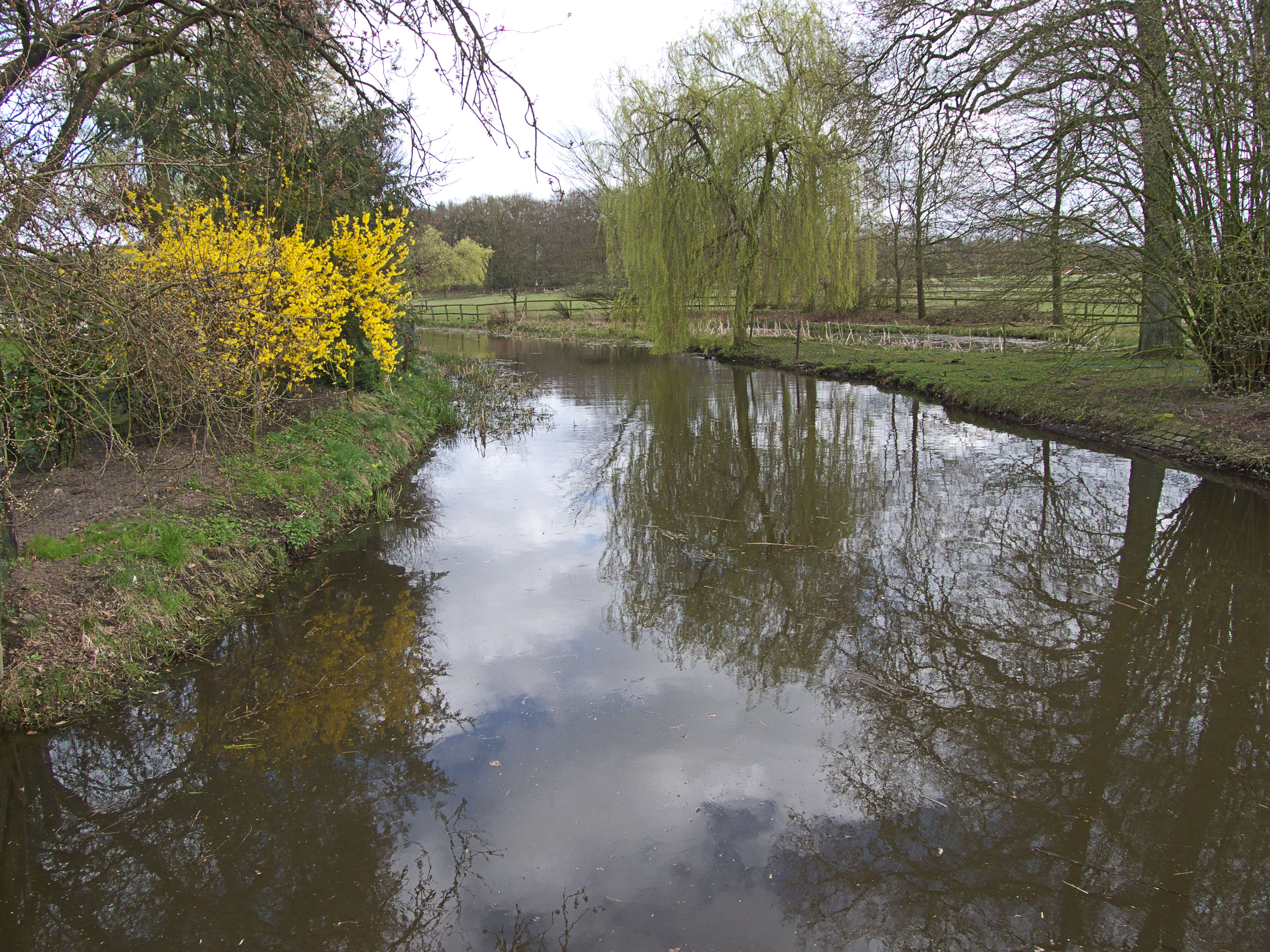 Oostendorper Watermolen, Haaksbergen. Buurserbeek bovenstrooms